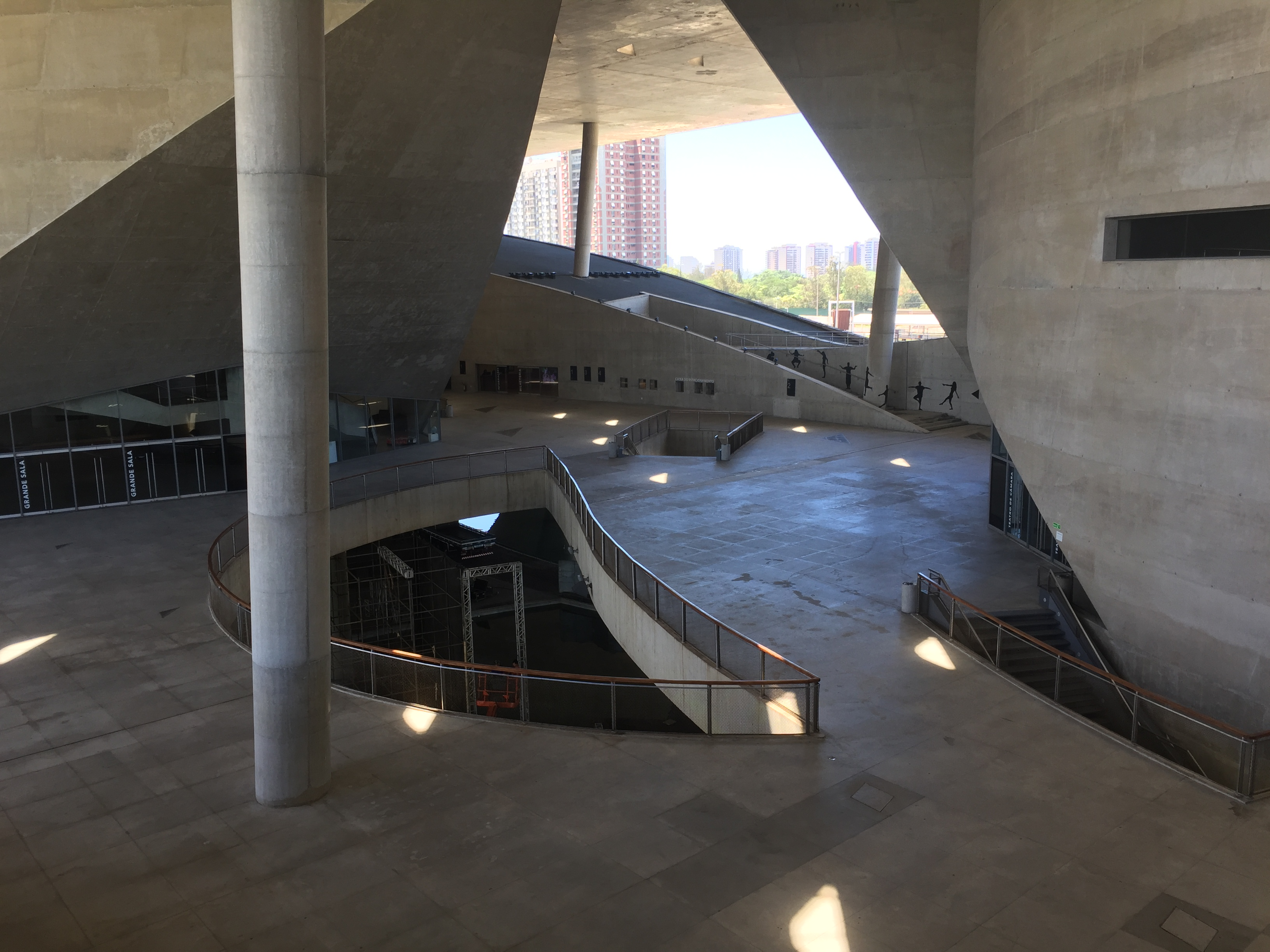 Detalhes da Cidade das Artes